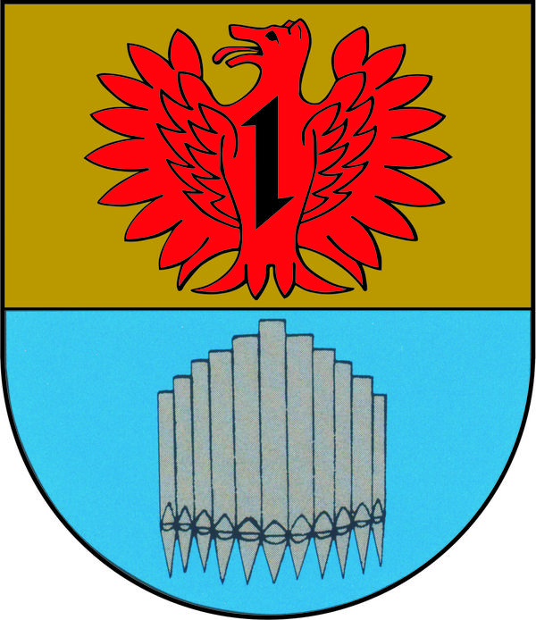 Wappen von Sulzbach (bei Idar-Oberstein)